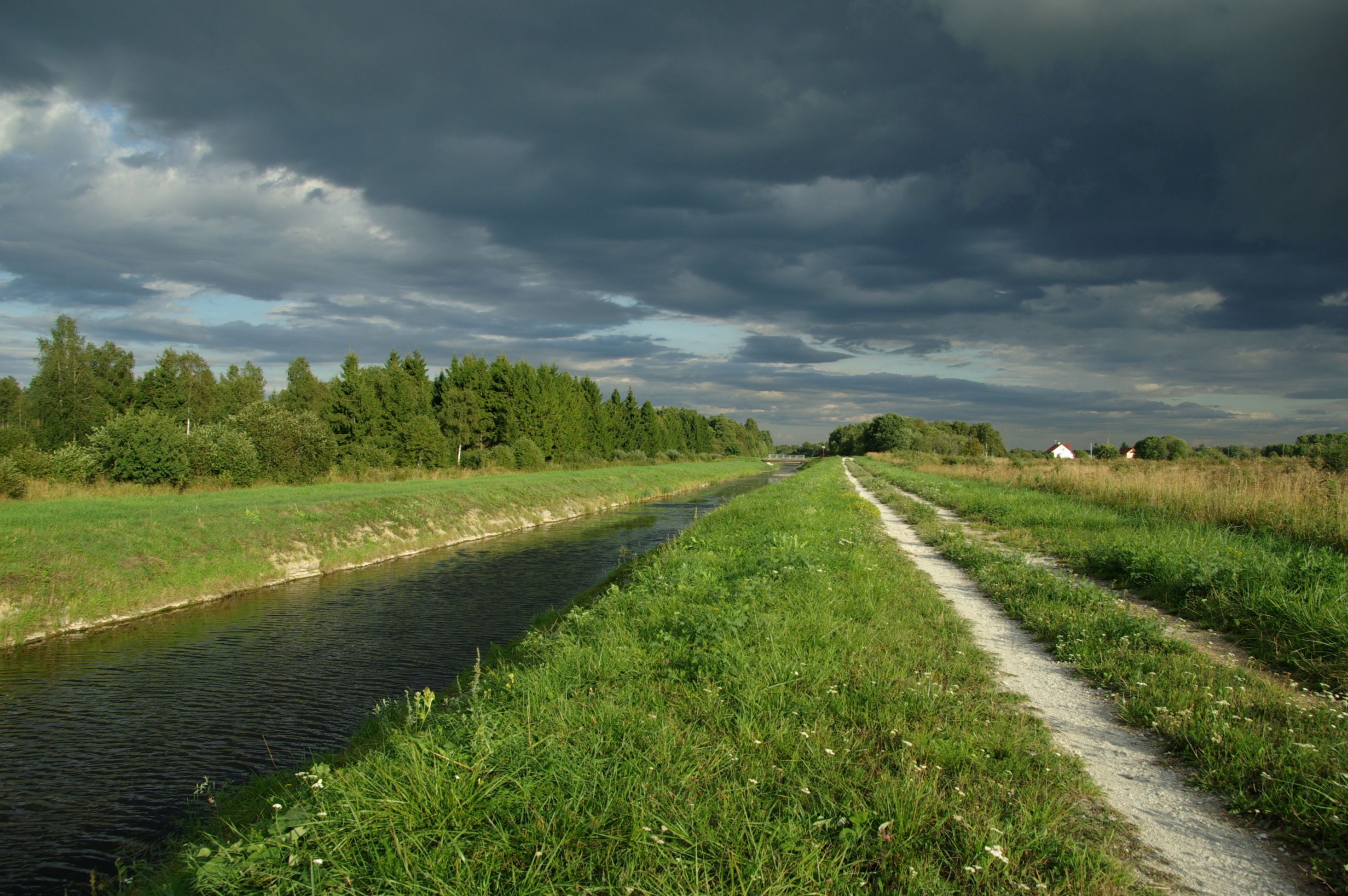 Vaskjala-Ülemiste kanal Rae vallas Rae külas